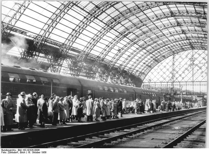 Dresden, Hauptbahnhof, Bahnsteig Zentralbild Zühlsdorf 18.10.1956 Das neue Dresden Der Hauptbahnhof von Dresden erhält ein neues Glasdach. (Aufnahme September 1956)